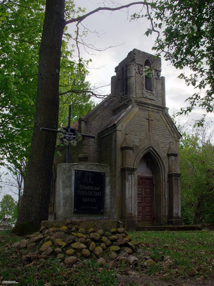 Вялікая Ракавіца. Капліца-пахавальня Талочкаў